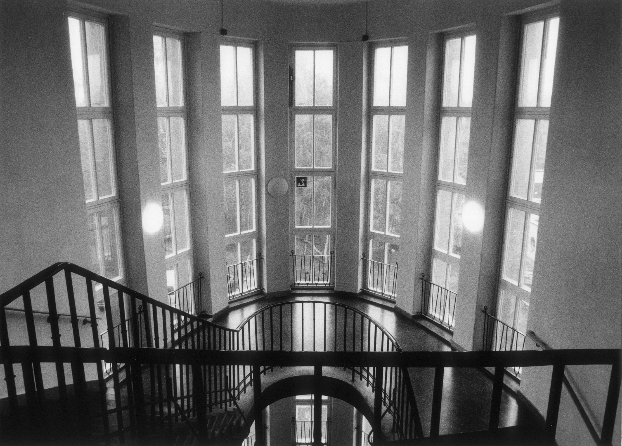 11. Schule, Leipzig, Berthastraße. Dargestellt ist das östliche Treppenhaus